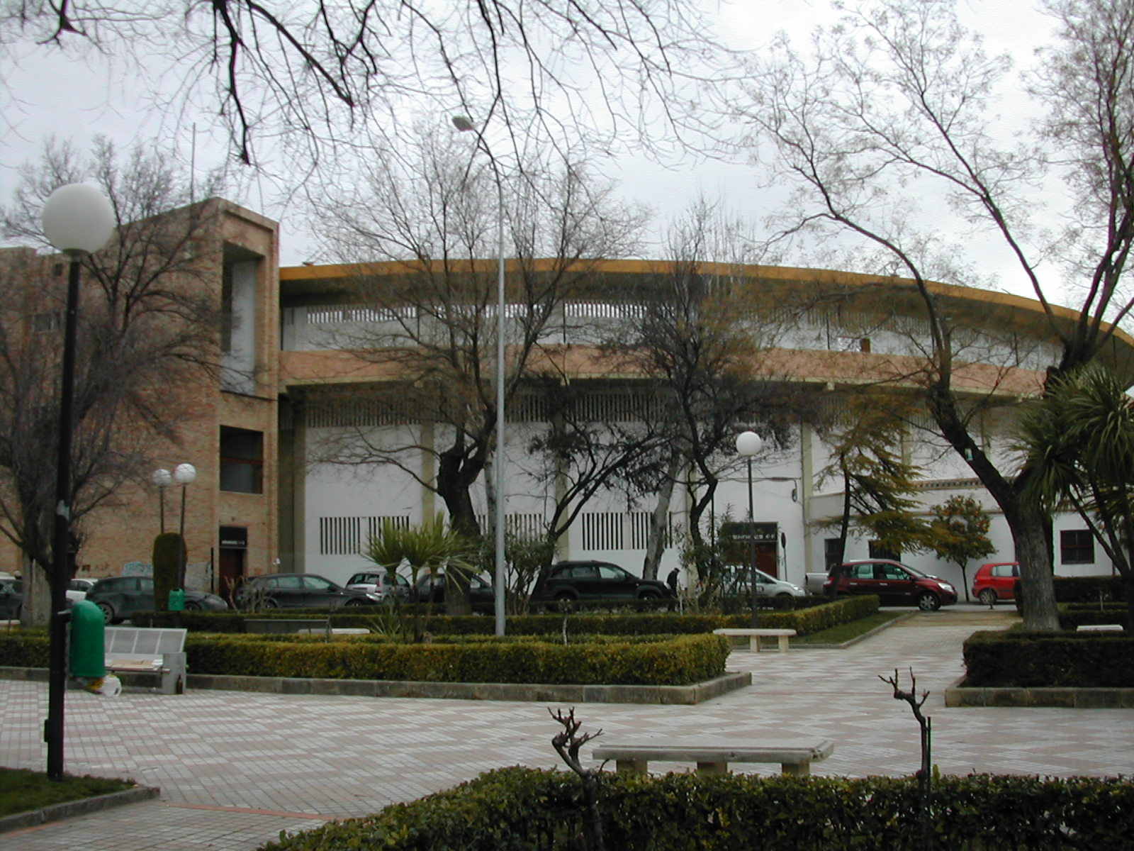 Plaza de Toros y Alameda de Capuchinos de Jaén.